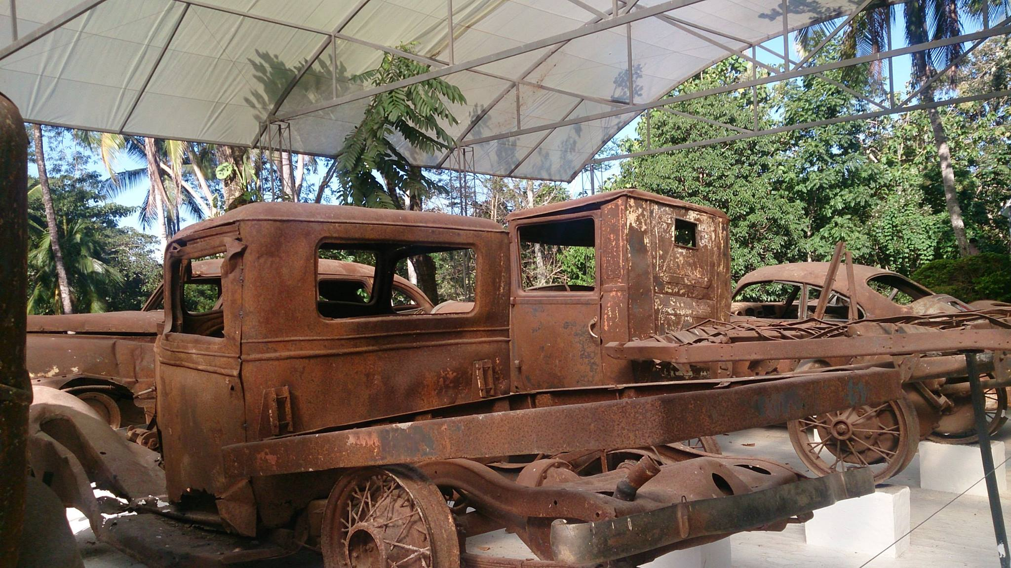 Esta fotografía fue tomada en el municipio colombiano con código 05591.